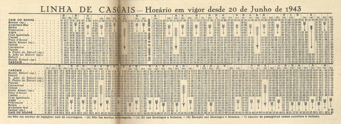 Horários da Linha de Cascais, em Portugal, em 1943. Esta imagem foi publicada na Gazeta dos Caminhos de Ferro n.º 1333, de 1 de Julho de 1943, e digitalizada pela Hemeroteca Municipal de Lisboa.